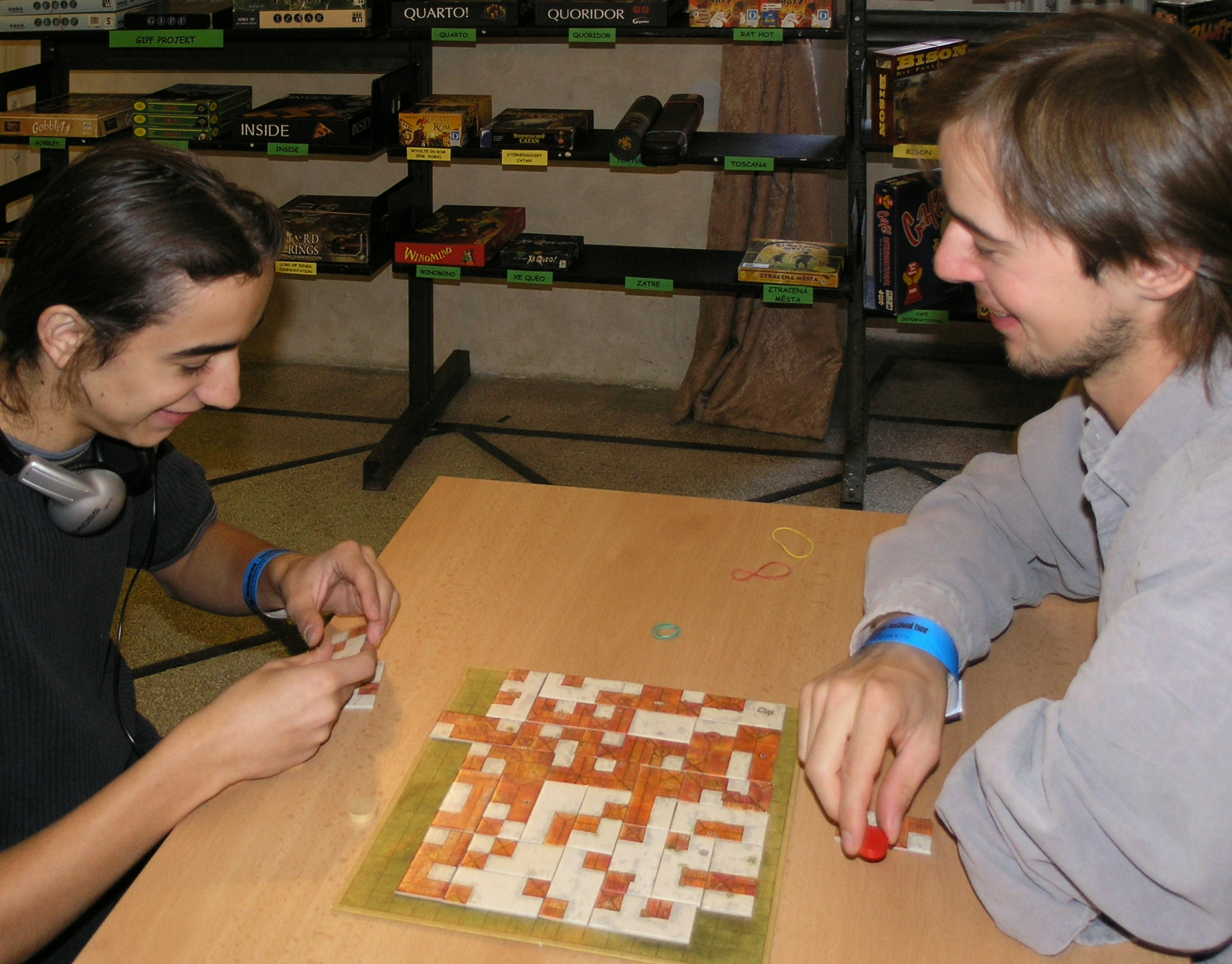 Deskohraní 2008